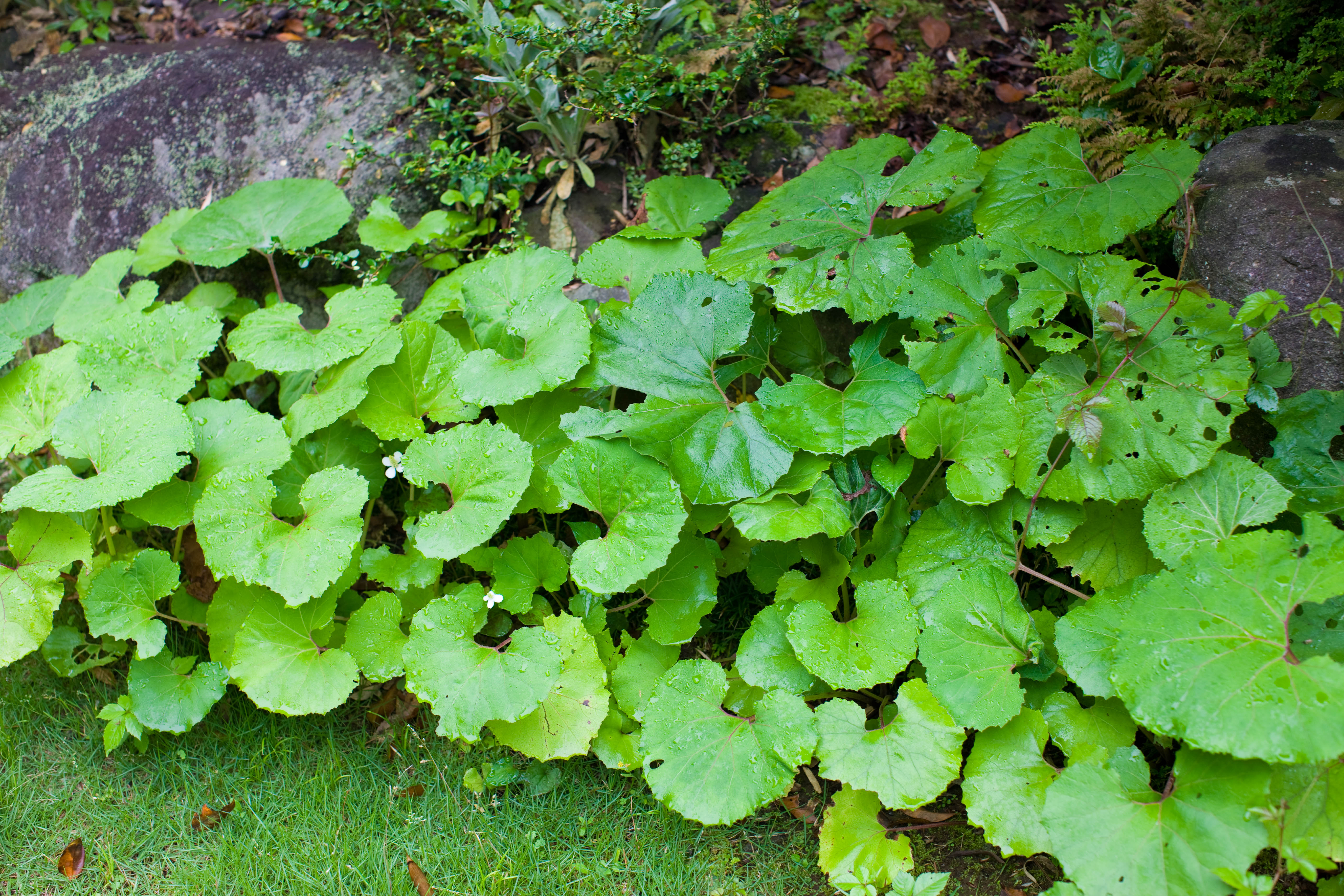 Fuki